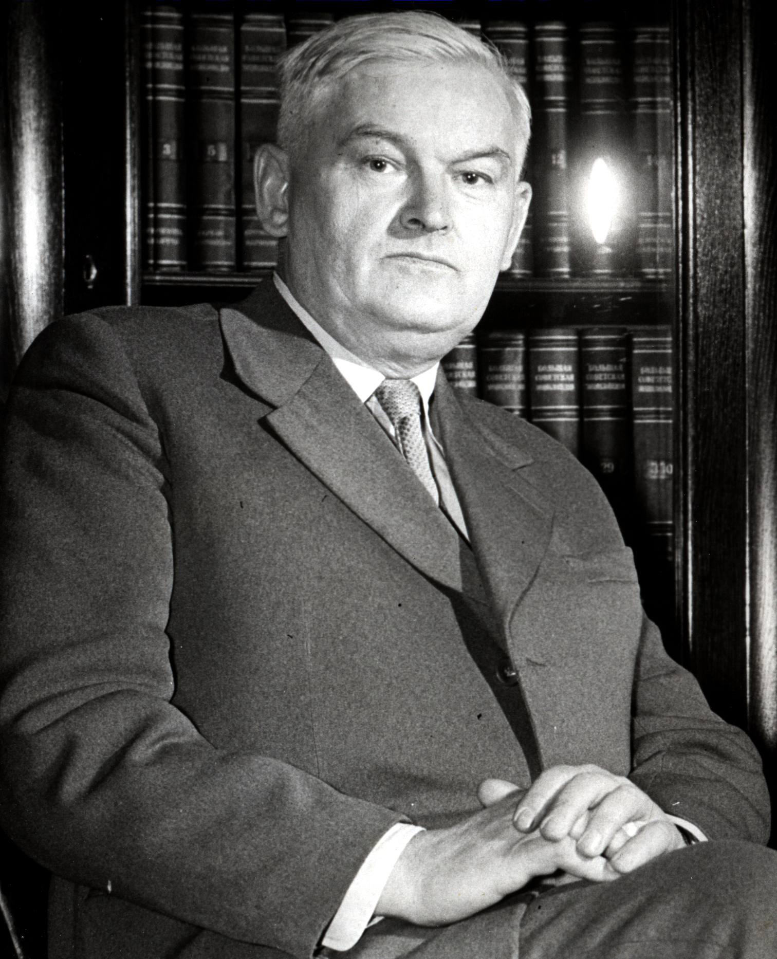 Boleslaw Szabelski, polski kompozytor (1896-1979)